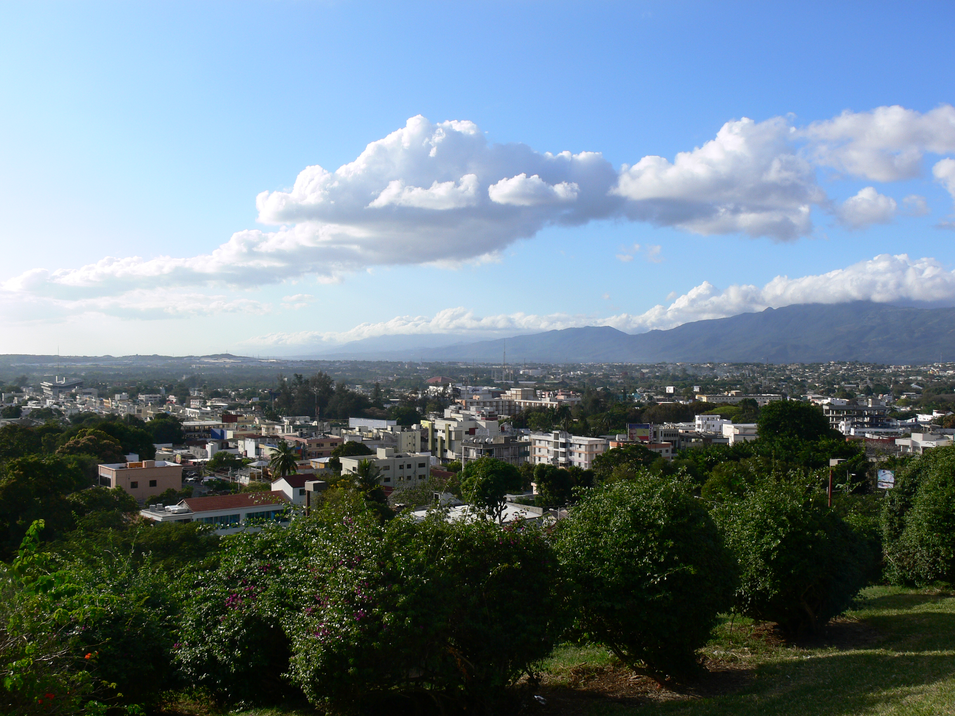 Blick auf die Stadt Santiago de los Caballeros